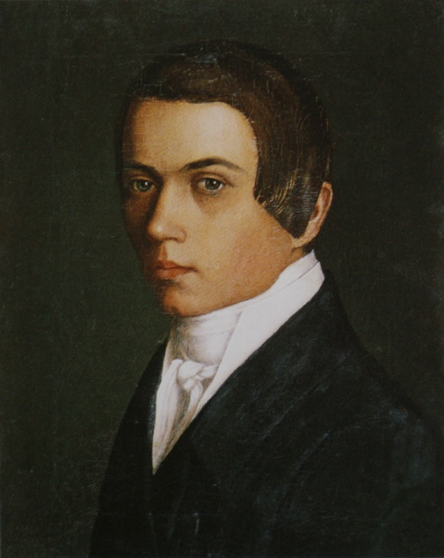 Г.В. Сорока — выдающийся художник, человек трагической судьбы. Был крепостным помещика Н.П. Милюкова, исполнял обязанности живописца и садовника в его усадьбе Островки. В начале 1840-х годов стал учеником А.Г. Венецианова, которого связывали с Милюковым дружеские отношения. Однако все попытки Венецианова добиться освобождения Сороки были безуспешными. Художник остался безвестным деревенским живописцем. В начале 1860-x годов за участие в крестьянских волнениях он был приговорен к телесному наказанию и покончил с собой накануне исполнения приговора. В русском искусстве ,, Автопортрет" Сороки — один из наиболее искренних, вероятно, художник написал его „для себя". Портрет остался в его семье, где хранился более ста лет. В 1976 году на открытии выставки, посвященной творчеству Сороки, правнуки художника передали его в дар Русскому музею.